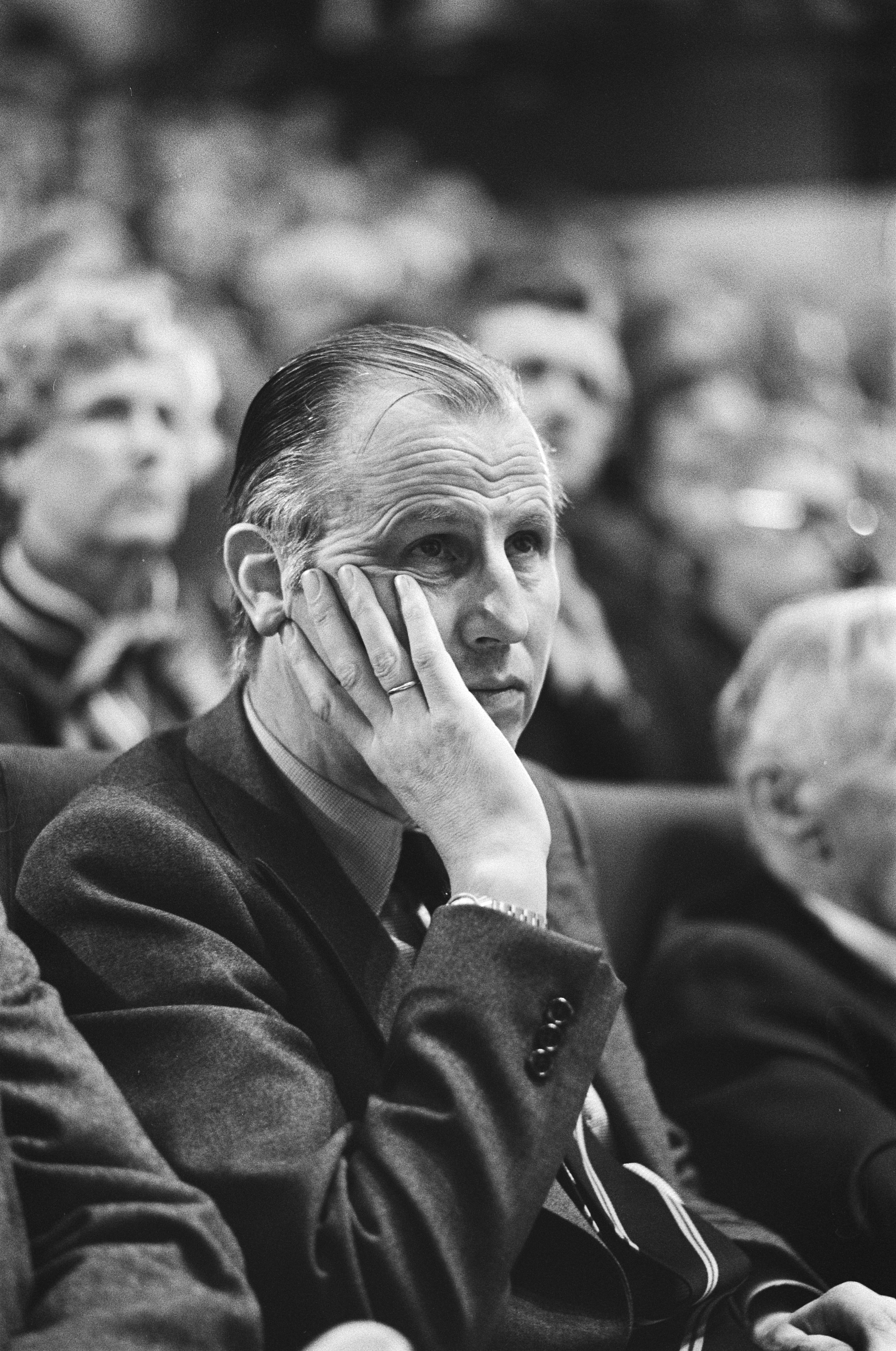 Collectie / Archief : Fotocollectie Anefo Reportage / Serie : ARP-partijraad in Rotterdam Beschrijving : Oud staatssecretaris De Jong Annotatie : (opdracht ARP) Datum : 9 december 1978 Locatie : Rotterdam, Zuid-Holland Trefwoorden : congressen, politici, politiek, politieke partijen Persoonsnaam : Jong Ozn., K. de Instellingsnaam : AR Fotograaf : Verhoeff, Bert / Anefo Auteursrechthebbende : Nationaal Archief Materiaalsoort : Negatief (zwart/wit) Nummer archiefinventaris : bekijk toegang 2.24.01.05 Bestanddeelnummer : 930-0377